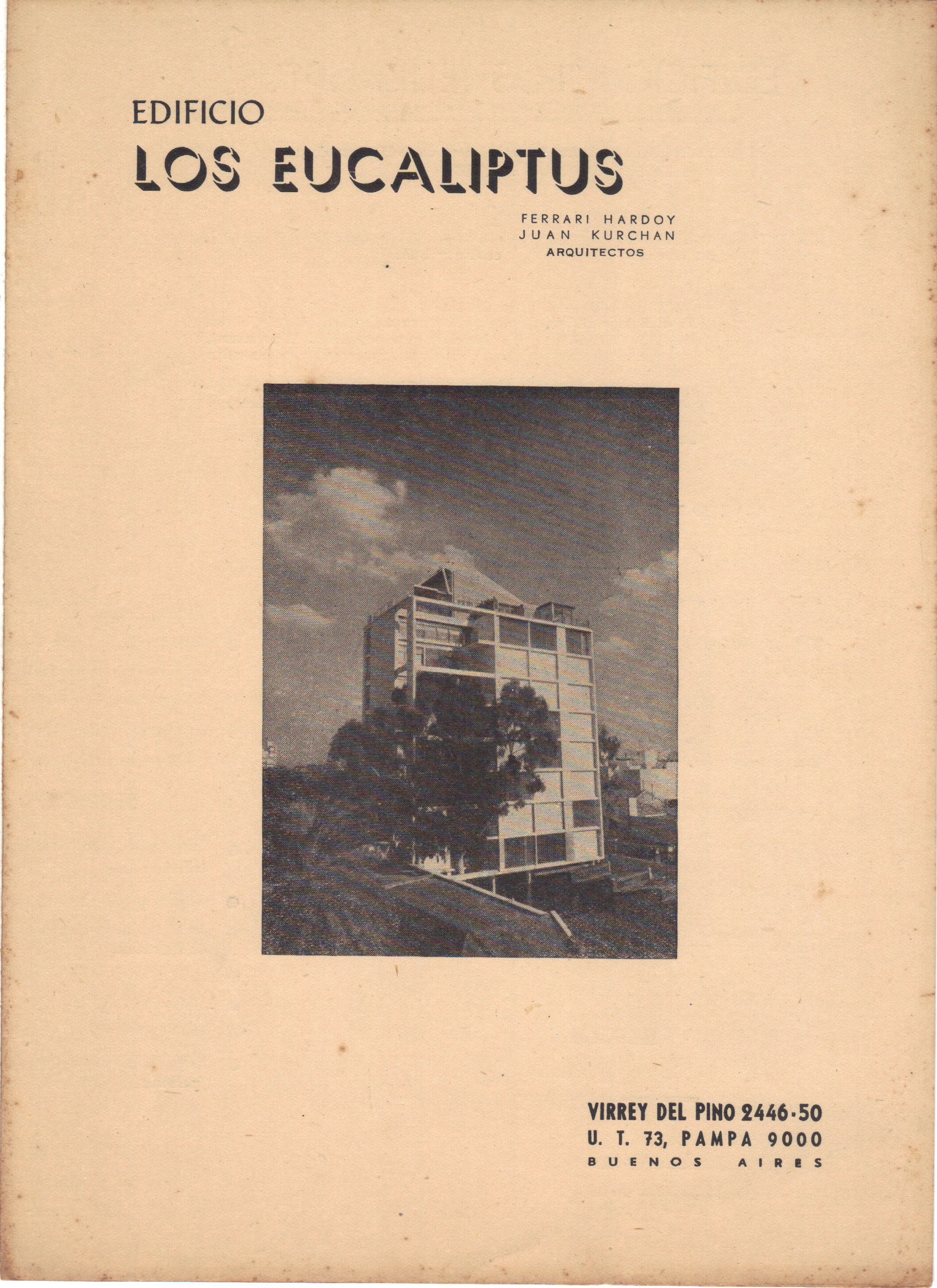 Los Eucaliptos, Folleto